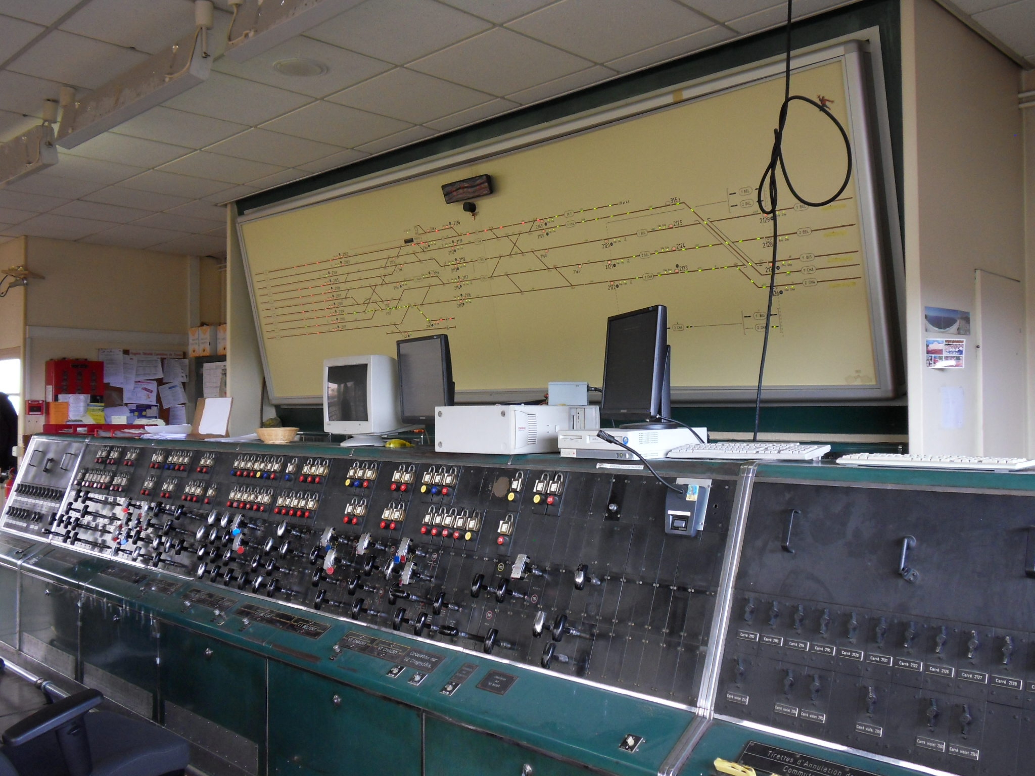 Gare de Dijon-Ville, France. L'ancien poste 2 de type néoclassique à leviers d'itinéraires quelques jours avant sa fin de fonctionnement